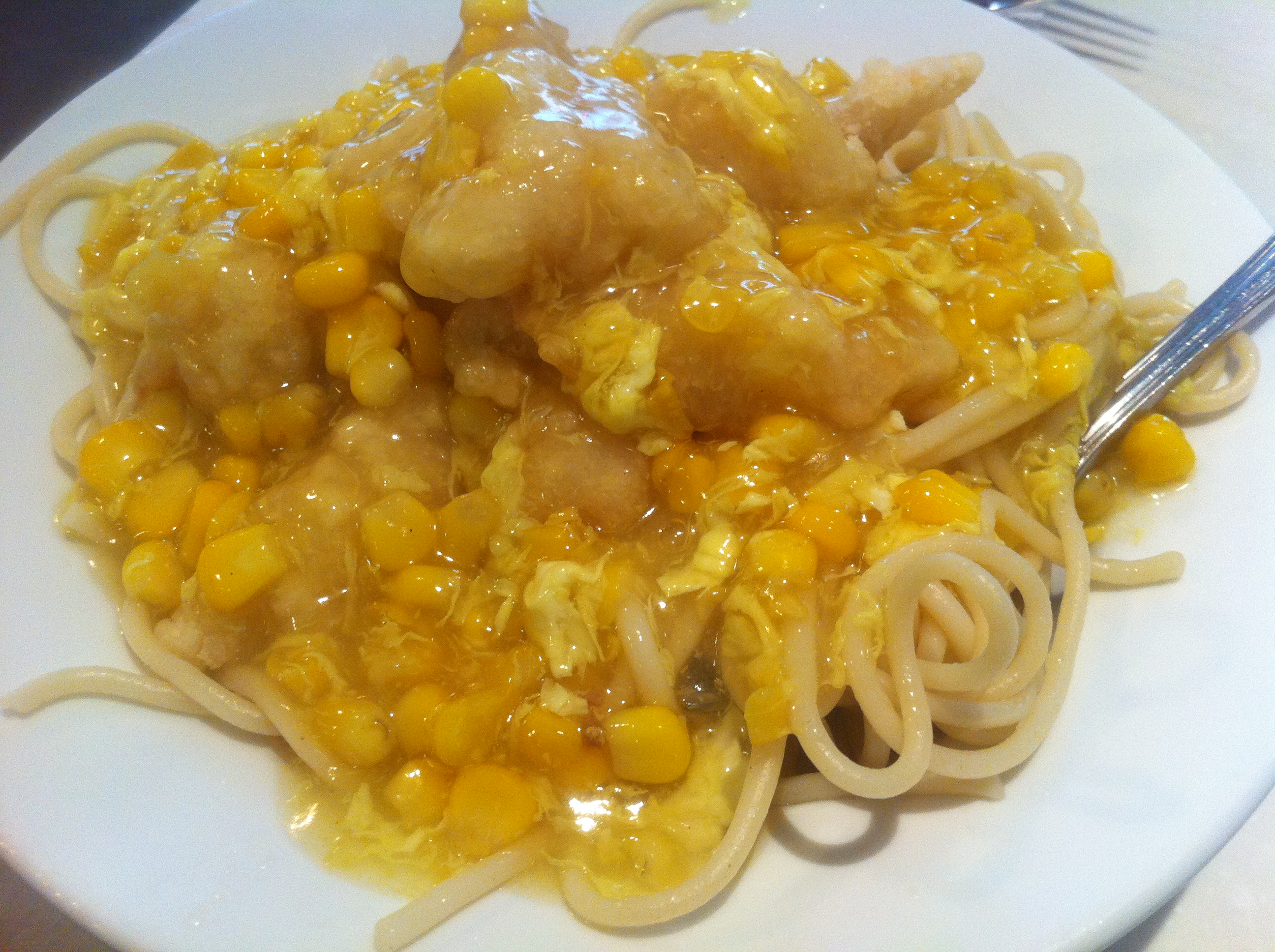 中文（香港）: 香港島西環 鴻興茶餐廳